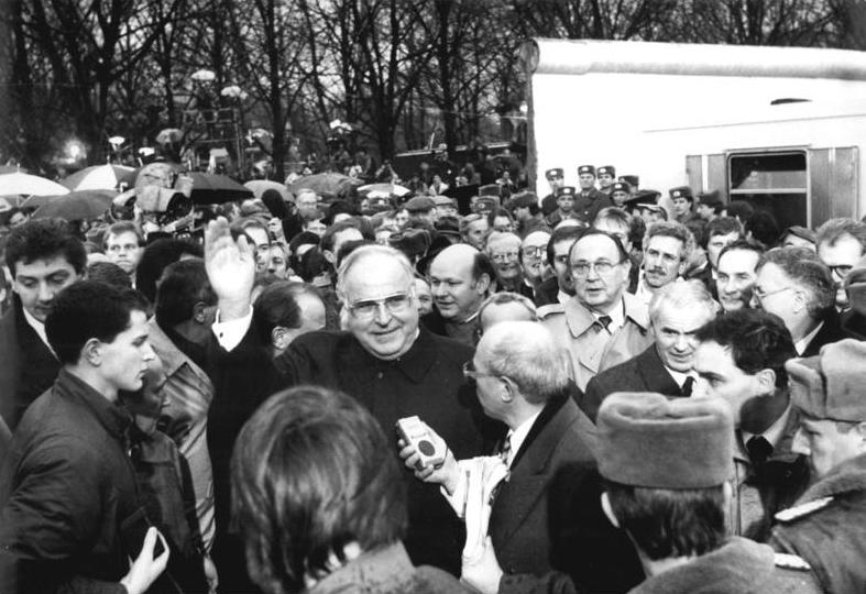 ADN-ZB-Oberst-22.12.89-Berlin: Brandenburger Tor-Tausende auf beiden Seiten des Brandenburger Tores feierten die Öffnung des neuen Grenzübergangs am zweihundertjährigen Berliner Wahrzeichen. Bundeskanzler Dr. Helmut Kohl (M), der Regierende Bürgermeister von Berlin (West), Walter Momper (3.v.r.), Außemminister Hans-Dietrich Genscher (2.v.r.) und Ministerpräsident Dr. Hans Kodrow (r) beim Eröffnungsgang.